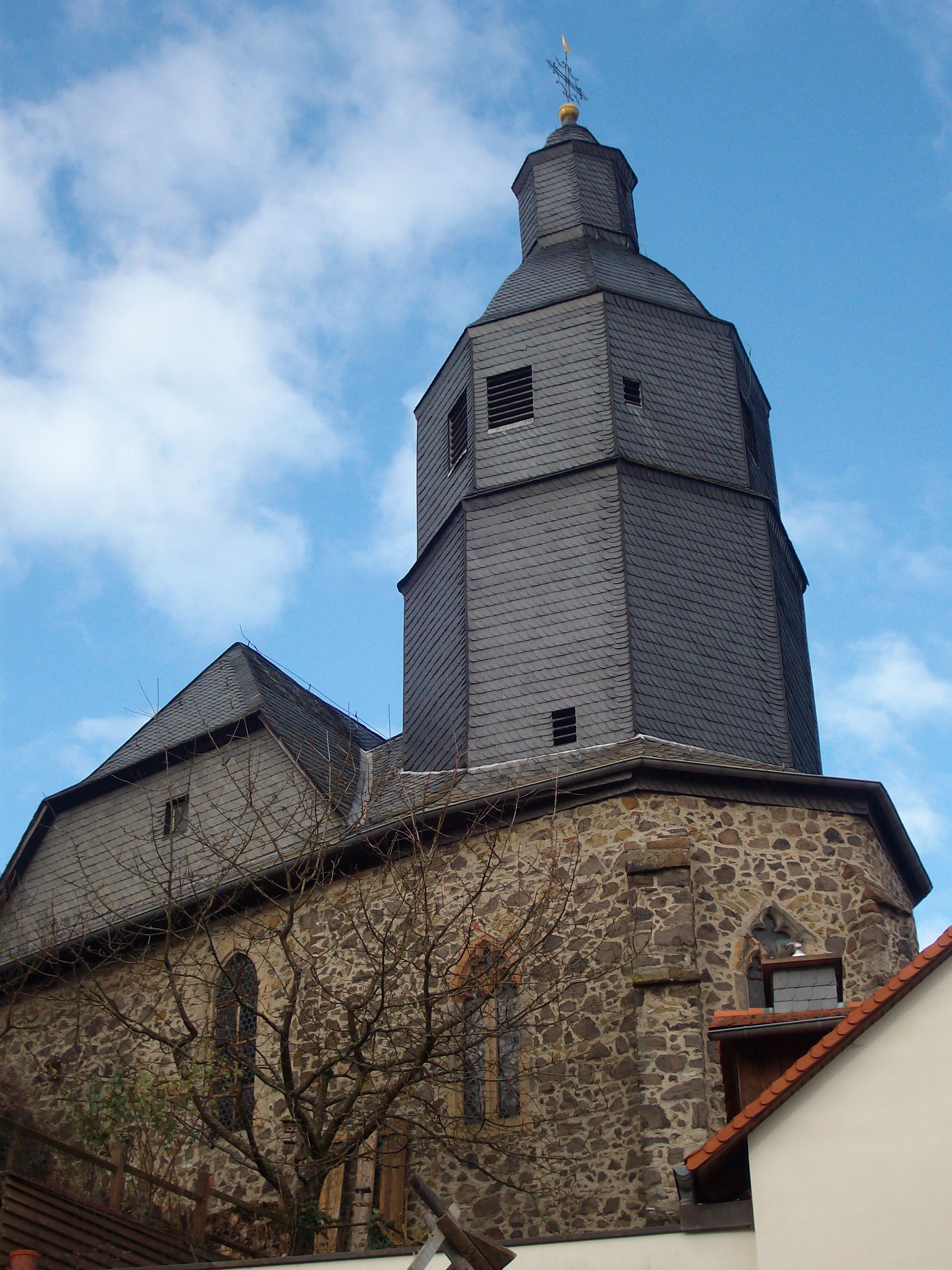 Evangelische Katharinenkirche Gleiberg, Landkreis Gießen, Hessen, Deutschland